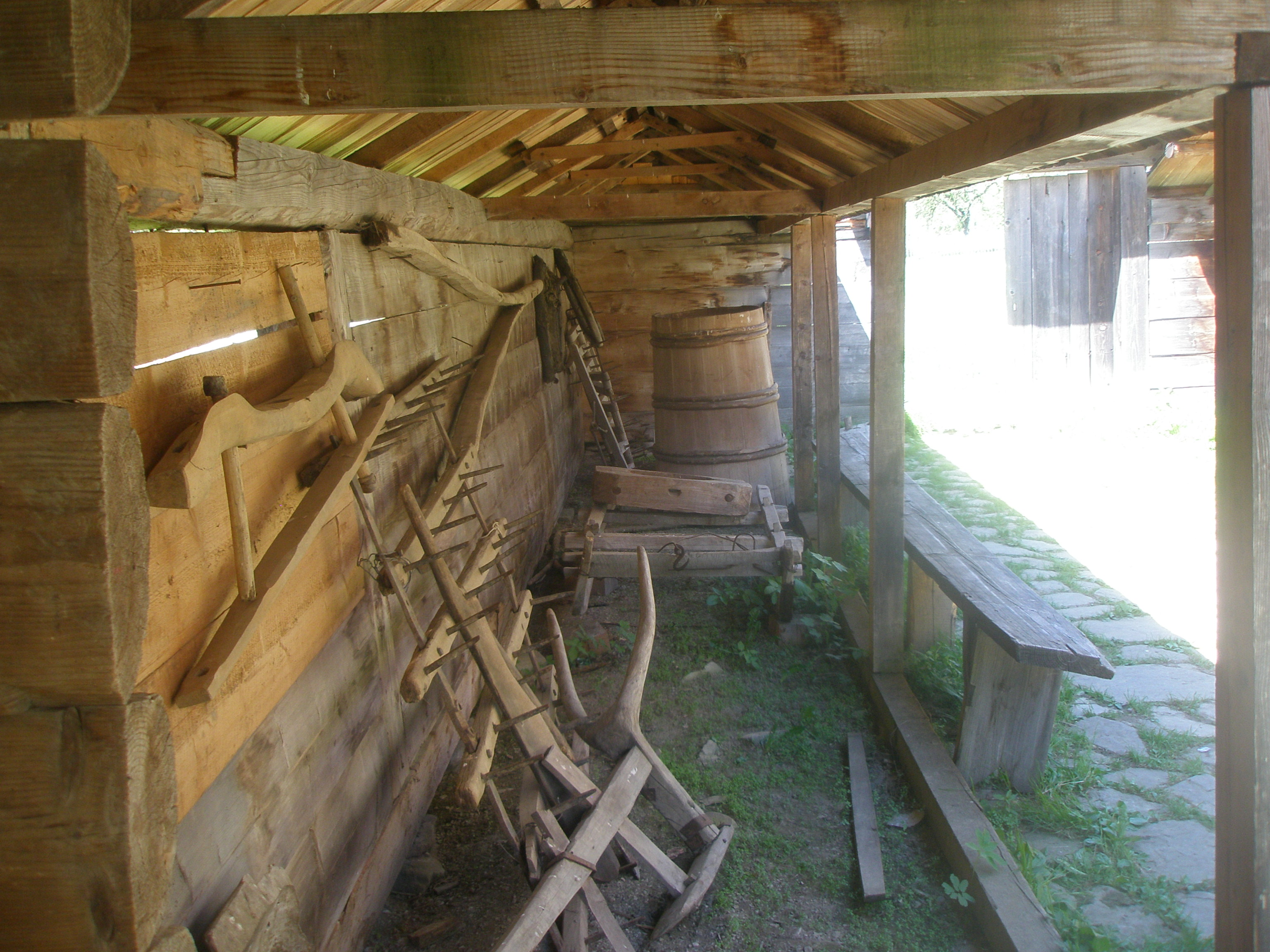 У хаті-гражді від Параджанова